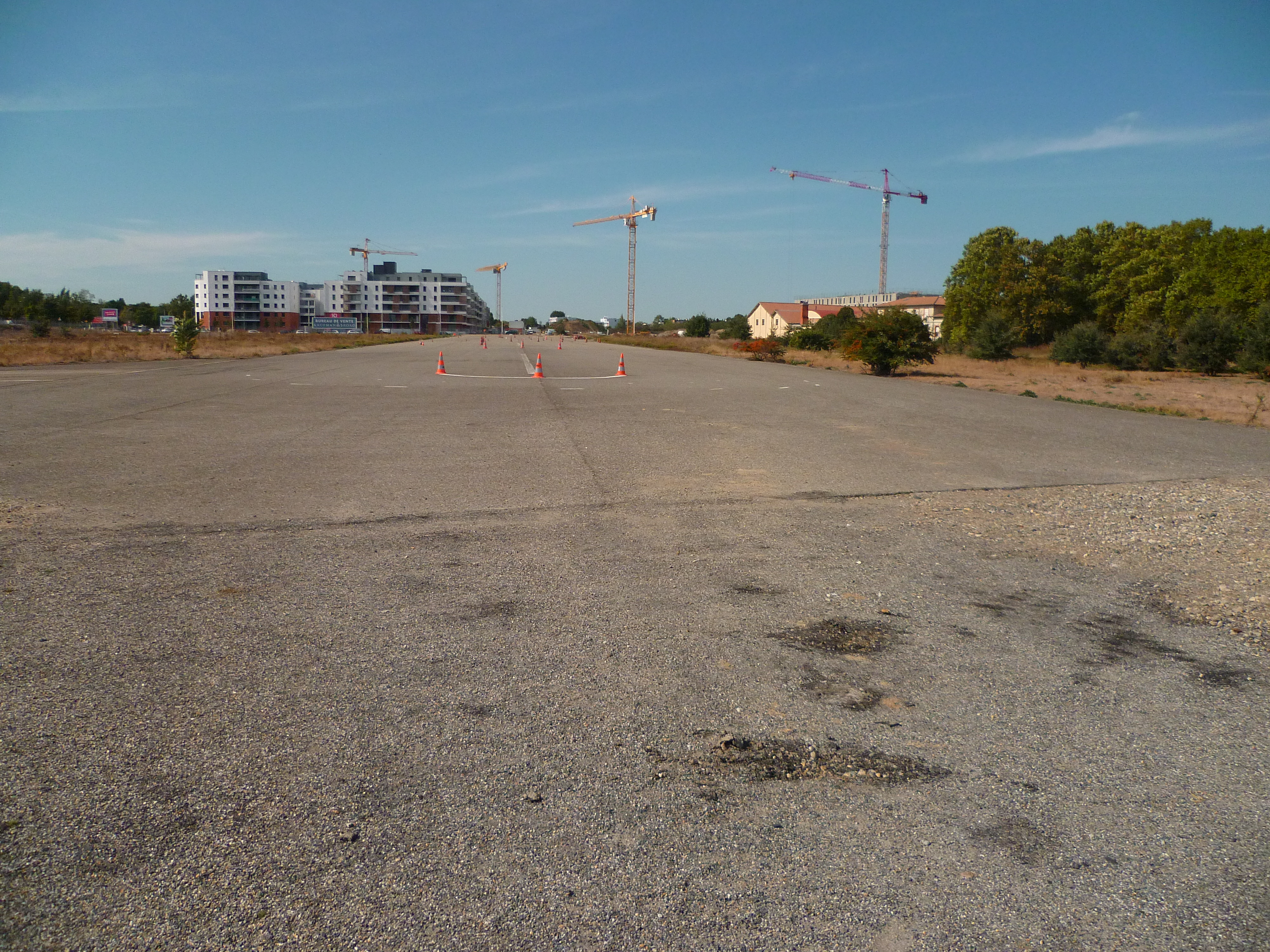 La piste de l'ancien aérodrome de Montaudran à Toulouse. A droite, l'ancienne usine Latécoère. .